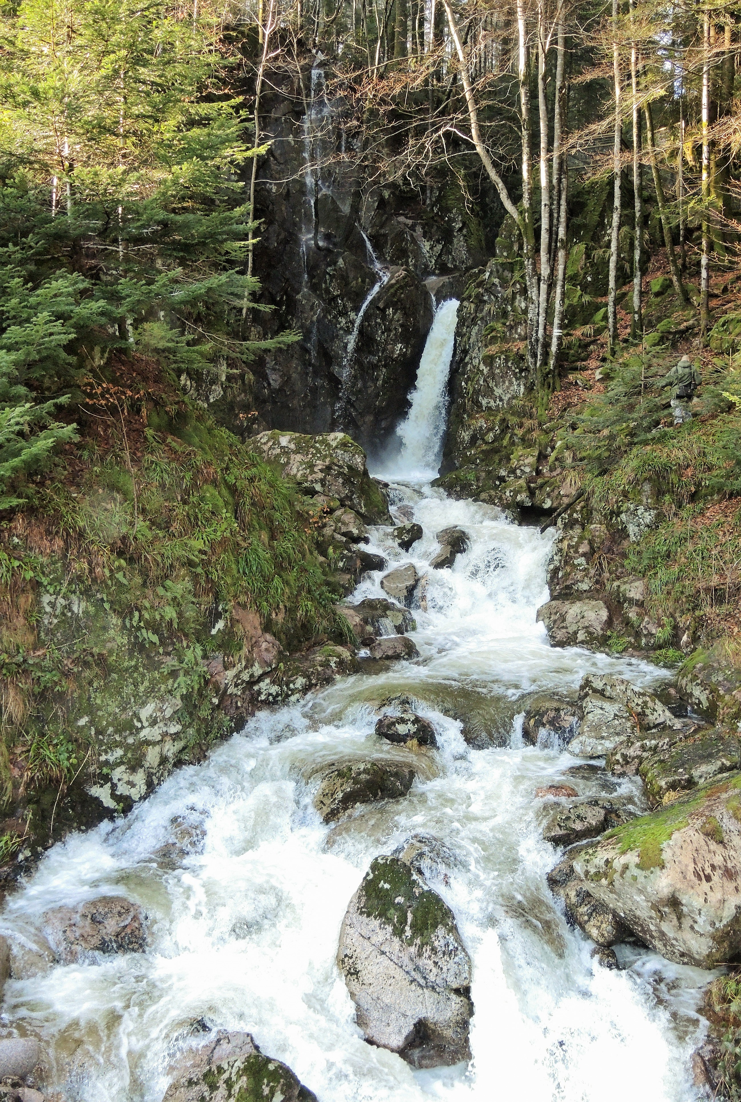 La Savoureuse au saut de la truite, après de fortes pluies. Lepuix - Malvaux. Territoire de Belfort